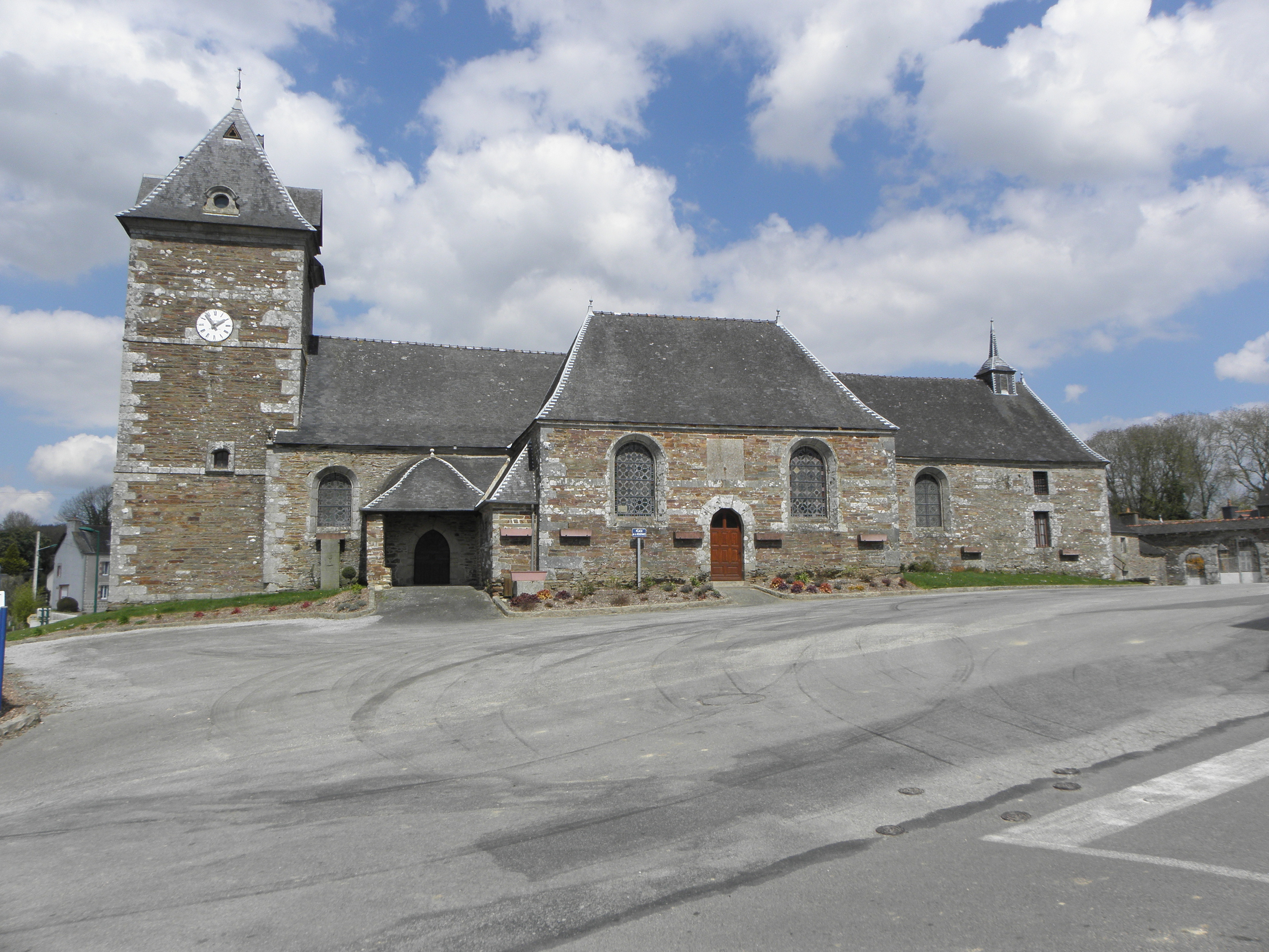 Église Sainte-Marie-Madeleine de Saint-Guen (22). Vue méridionale.